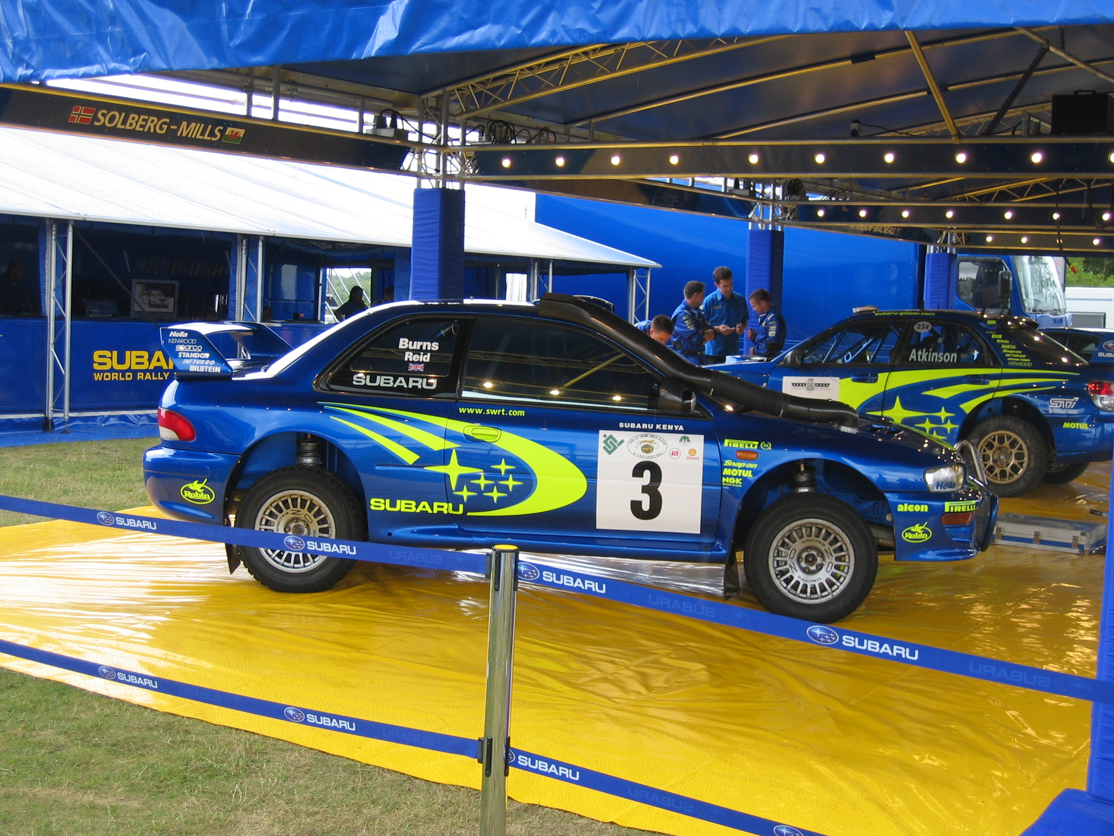 Richard Burns' Subaru Impreza WRC at 2006 GFoS.